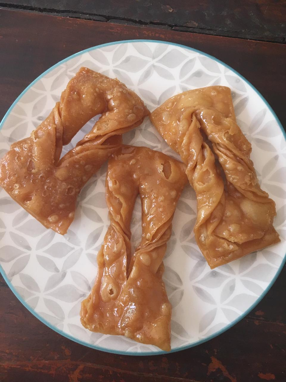 pâtisserie réunionnaise